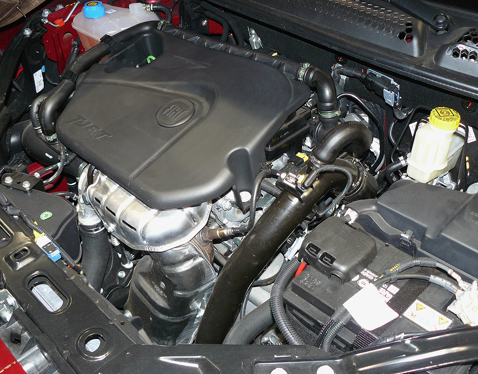 Fiat 1.4 Tjet engine 150 hp